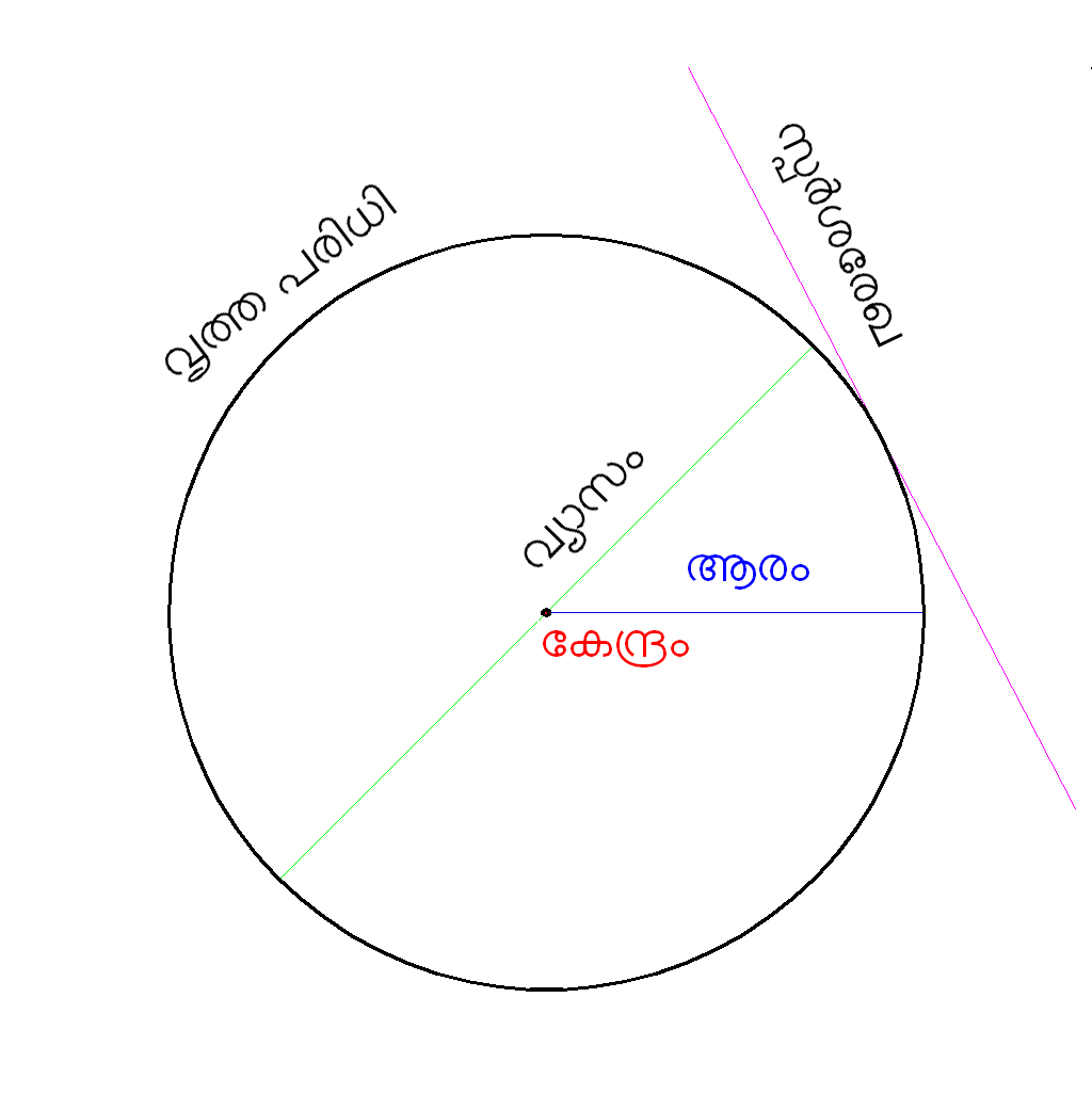 വൃത്തം എന്ന താളിനു വേണ്ടി